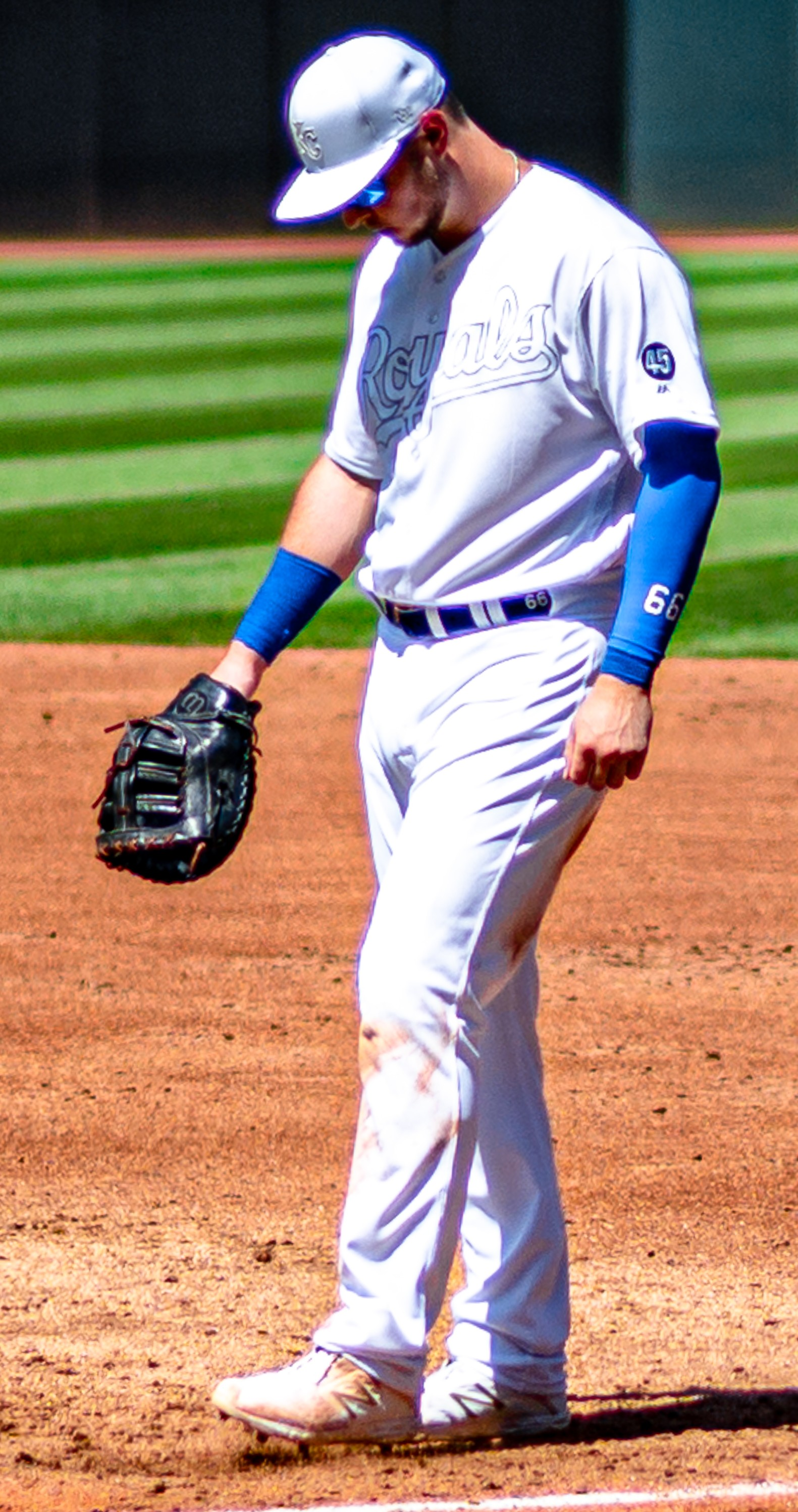 Kansas City Royals VS. Cleveland Indians